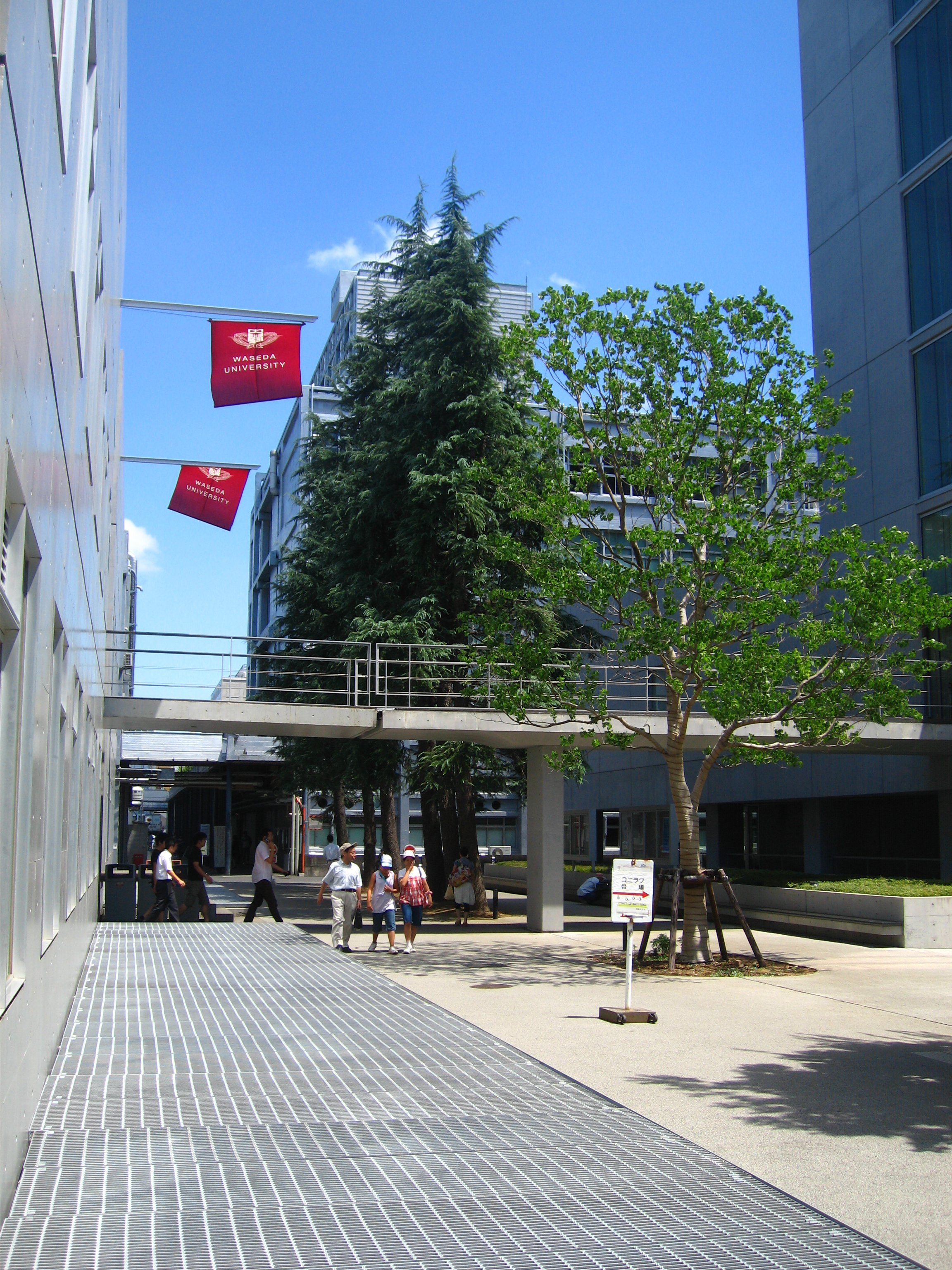 早稲田大学 西早稲田キャンパス (Nishi-Waseda Campus)